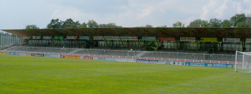 Stuttgart-Degerloch GAZi-Stadion Gegentribüne